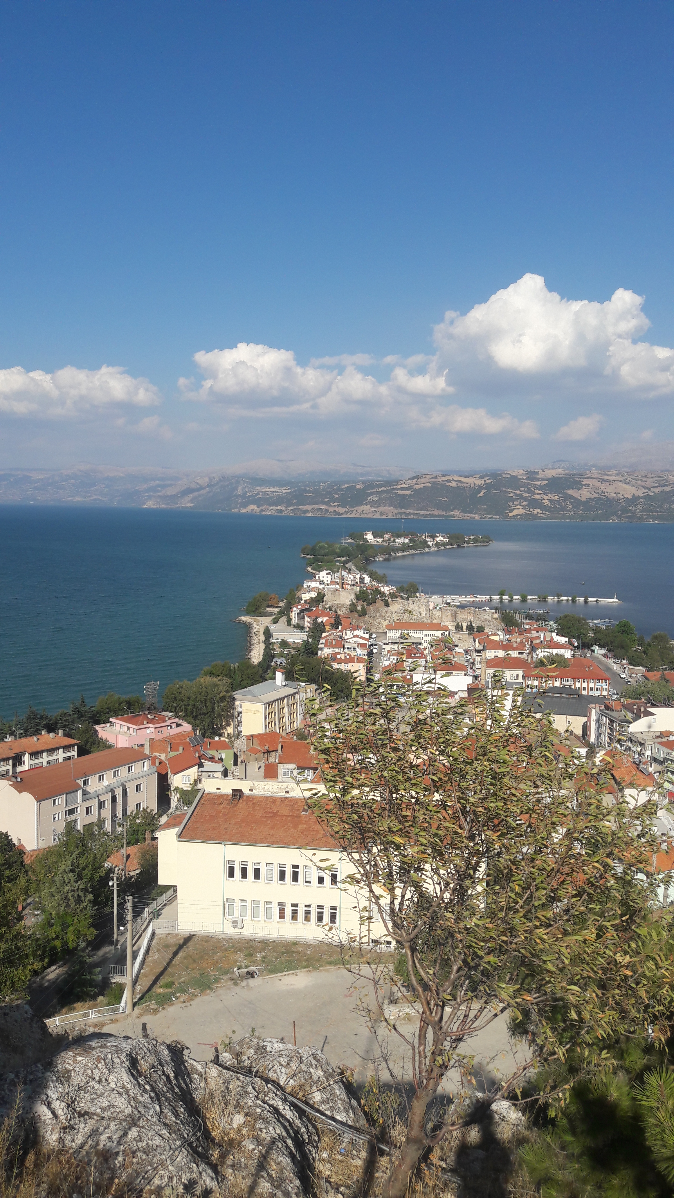 Eğirdir Lake